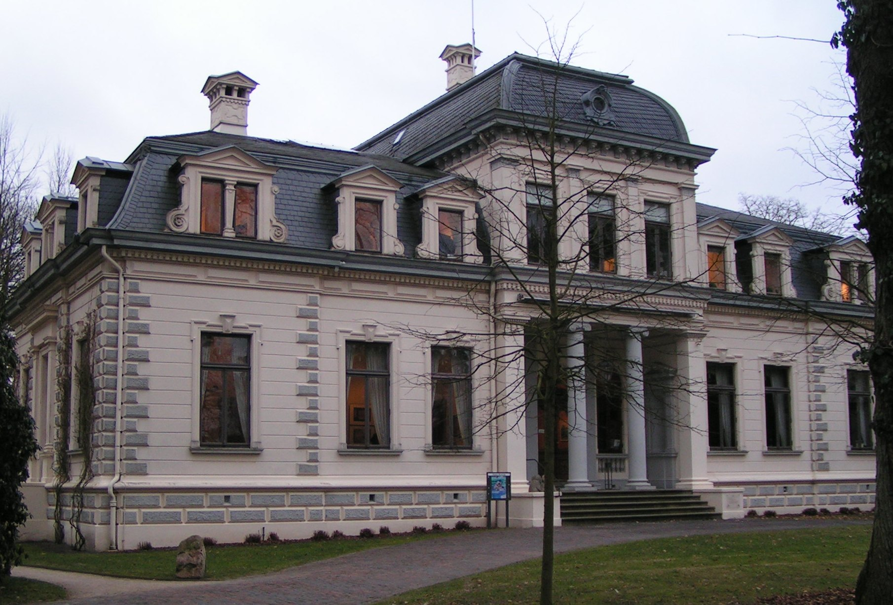 Erbprinzenpalais Rastede